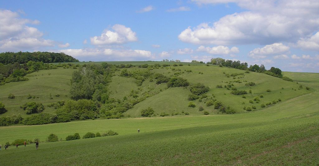 PR Hašky